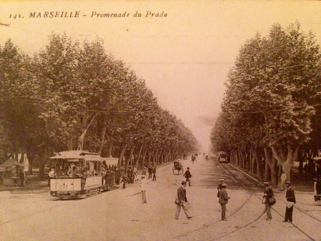 Carte postale de la "Promenade du Prado" au début du XXème siècle